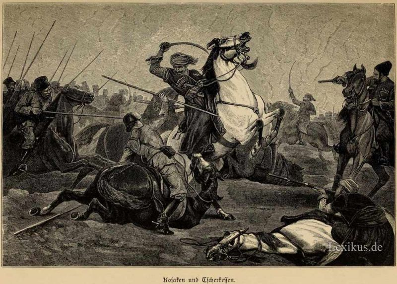 Kosaken-und-tscherkessen – Reise auf dem Kaspischen Meere und in den Kaukasus. Band 2 Unternommen in den Jahren 1825 — 1826